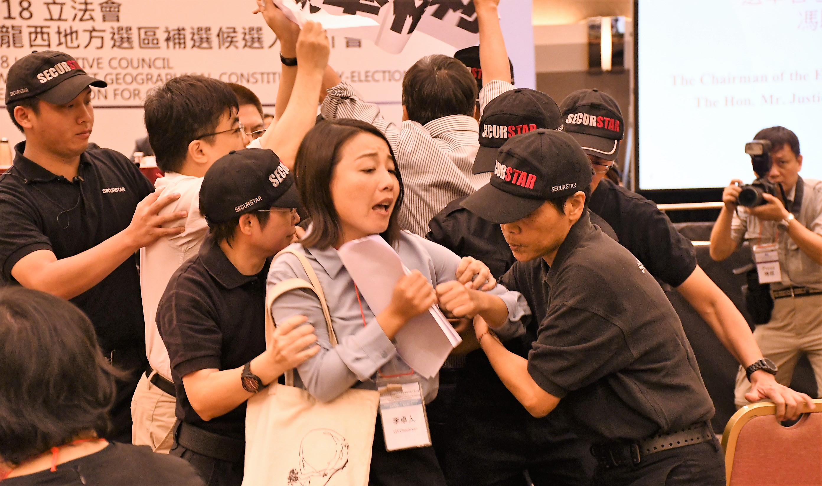 劉小麗被多名保安人員粗暴驅逐離場。(美國之音湯惠芸)